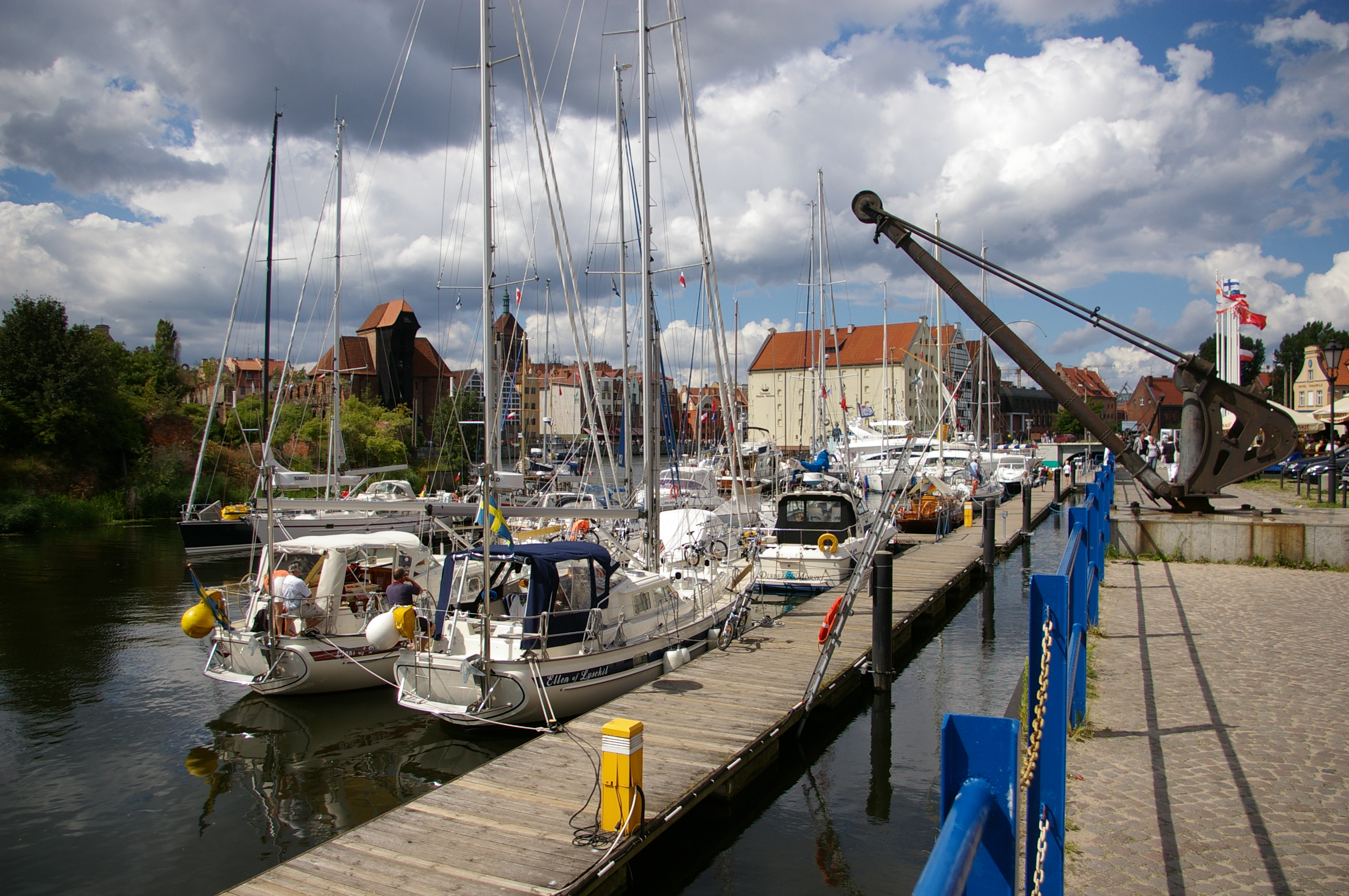 Marina w Gdańsku, w tle Żuraw